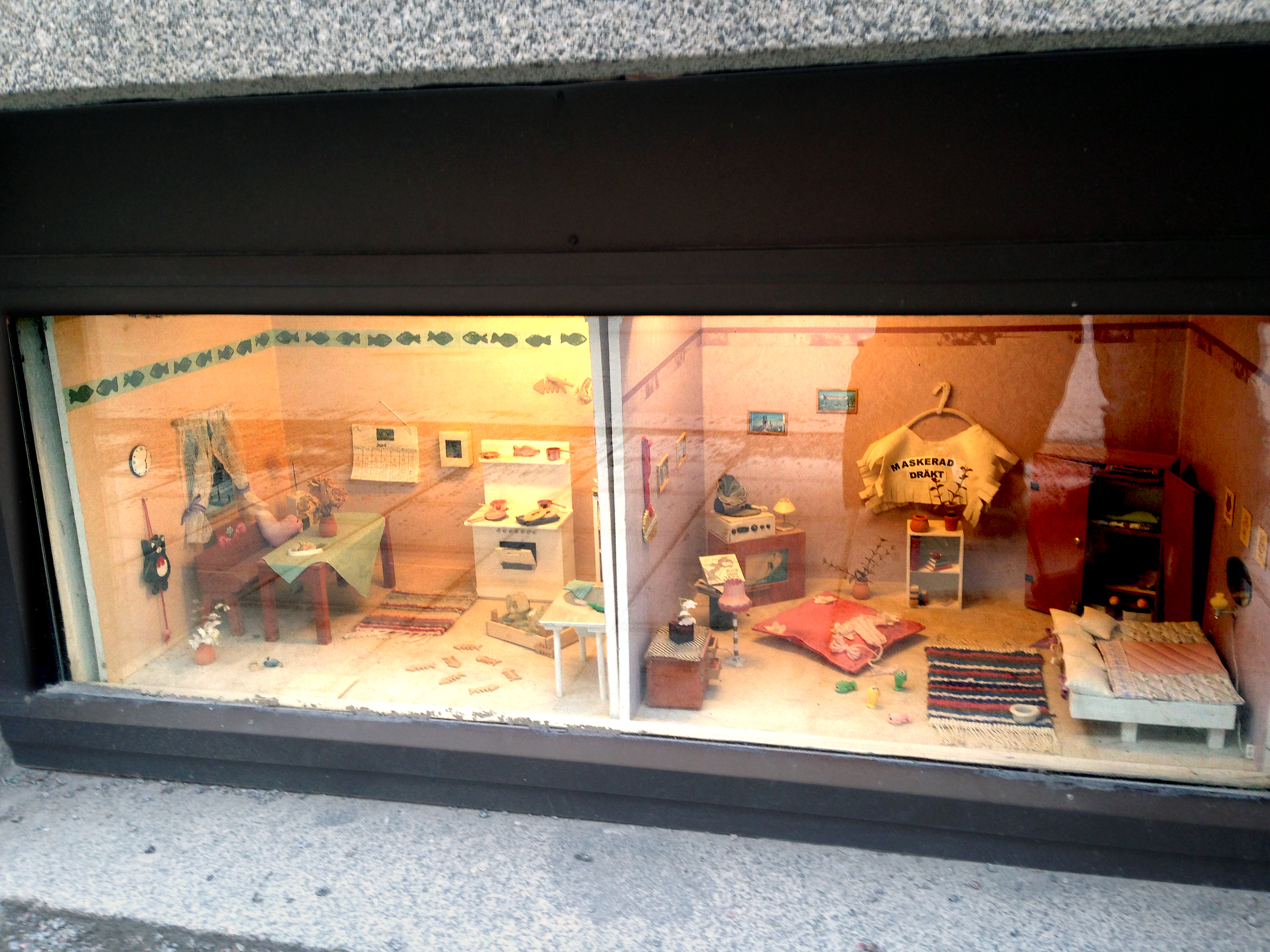 På Åsgränd i Uppsala finns denna glugg skapad för att ge ett intryck av hur det kan ha sett ut hos Pelle Svanslös och Maja Gräddnos